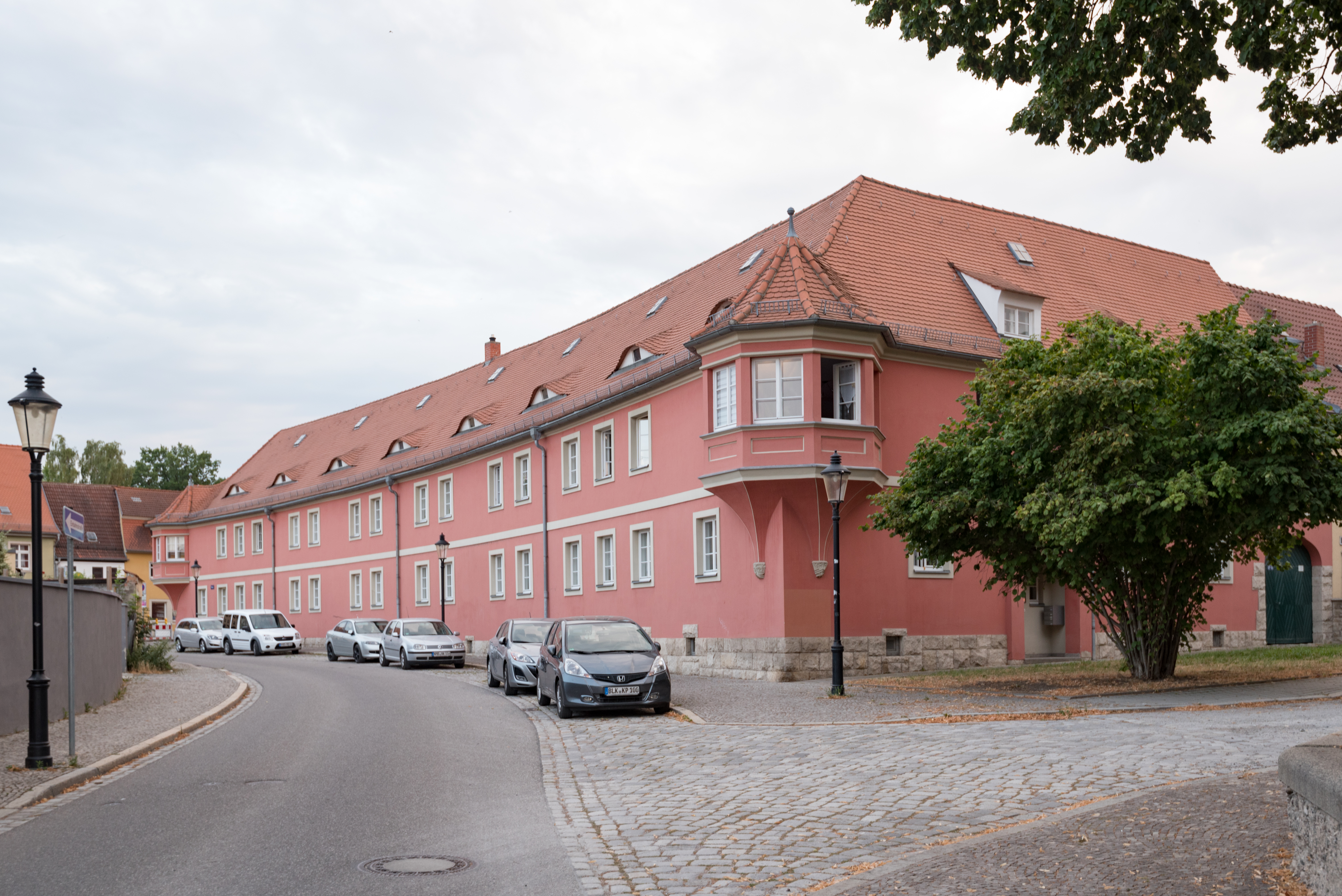 Naumburg (Saale), Moritzberg 41-44